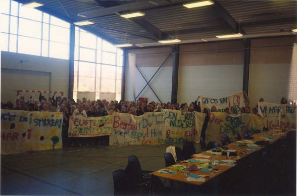 På Danske Skoleelevers landskonference i efteråret 2007 på Søndermarkskolen i Horsens blev der fremstillet bannere til brug for kampagnen 'Giv os lov' om elevernes ønske om et bedre fysisk undervisningsmiljø for eleverne i skolen, der bl.a. skulle synliggøres med demonstrationer d. 6. november 2007 forud for folketingsvalget d. 13. november 2007.